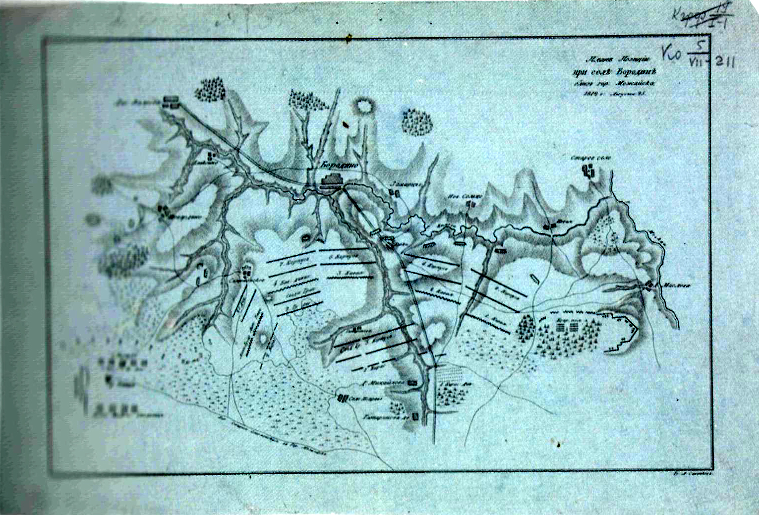 План позиции при селе Бородине близ гор. Можайска.1812 г., августа 25. Литография, РГБDate 5 October 2010Source Own workAuthor User:Сергей Соковнин План позиции при селе Бородине близ гор. Можайска.1812 г., августа 25. Литография, РГБ